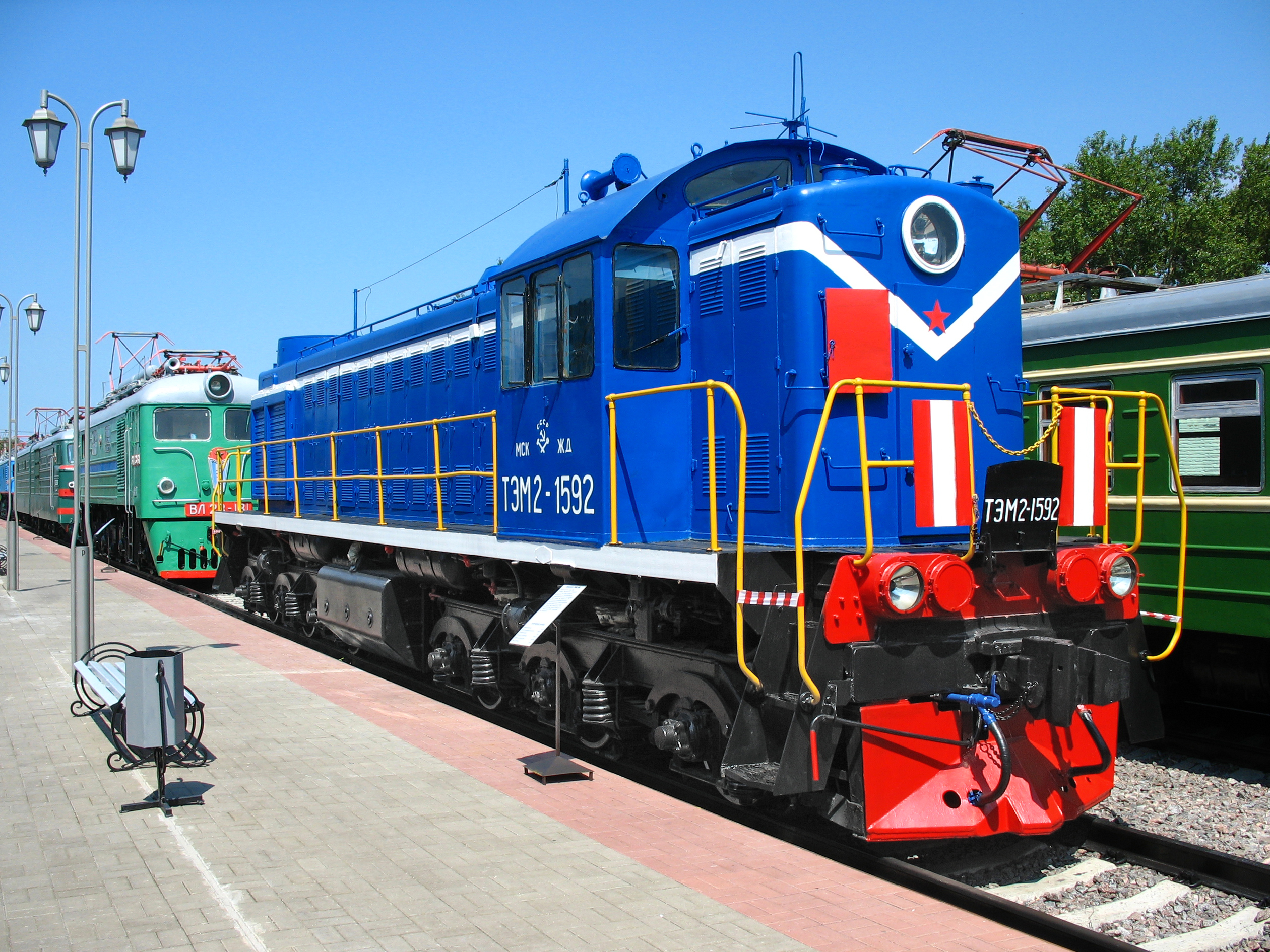 Маневровые тепловозы серии ТЭМ2 («Тепловоз с электропередачей, маневровый, тип 2») строились на Брянском машиностроительном и Ворошиловградском тепловозостроительном заводах. Тепловозы серии ТЭМ2 широко использовались на сети дорог МПС и в промышленности. Данный экземпляр (ТЭМ2-1592) построен в 1973-м году, служил на Московской железной дороге (ТЧ-28 Верховье, ТЧЭ-27 Орёл-Сортировочный). После снятия с эксплуатации, был отреставрирован в локомотивном депо Новомосковск. В данный момент - экспонат в Музее истории развития железнодорожного транспорта Московской железной дороги (на Рижском вокзале Москвы).